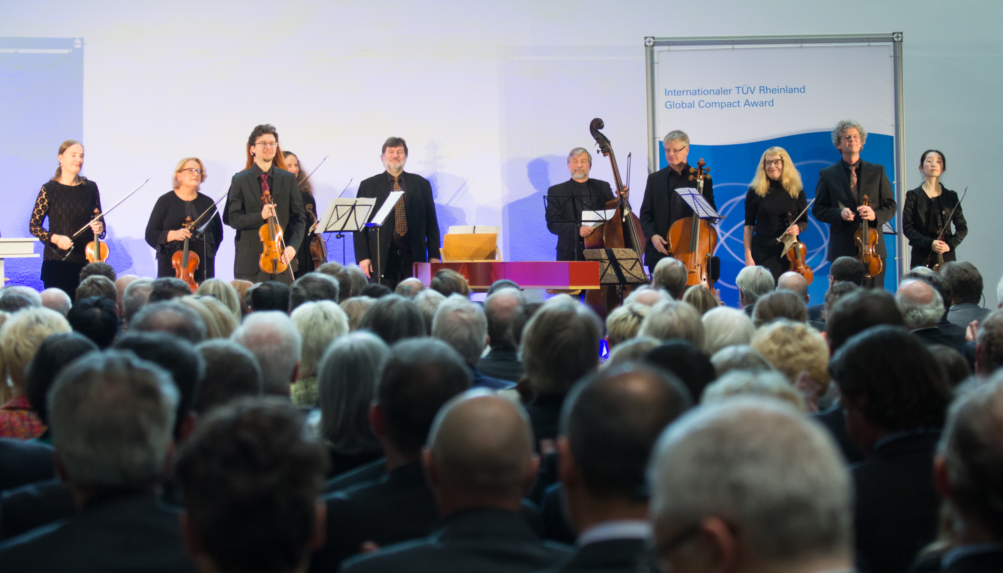 Dr. Auma Obama wird in der Piazzetta des Kölner Rathauses für Engagement für Entwicklungszusammenarbeit mit dem Internationalen TÜV Rheinland Global Compact Award geehrt. Auftritt Concerto Köln, Konzertmeister Evgeny Sviridov